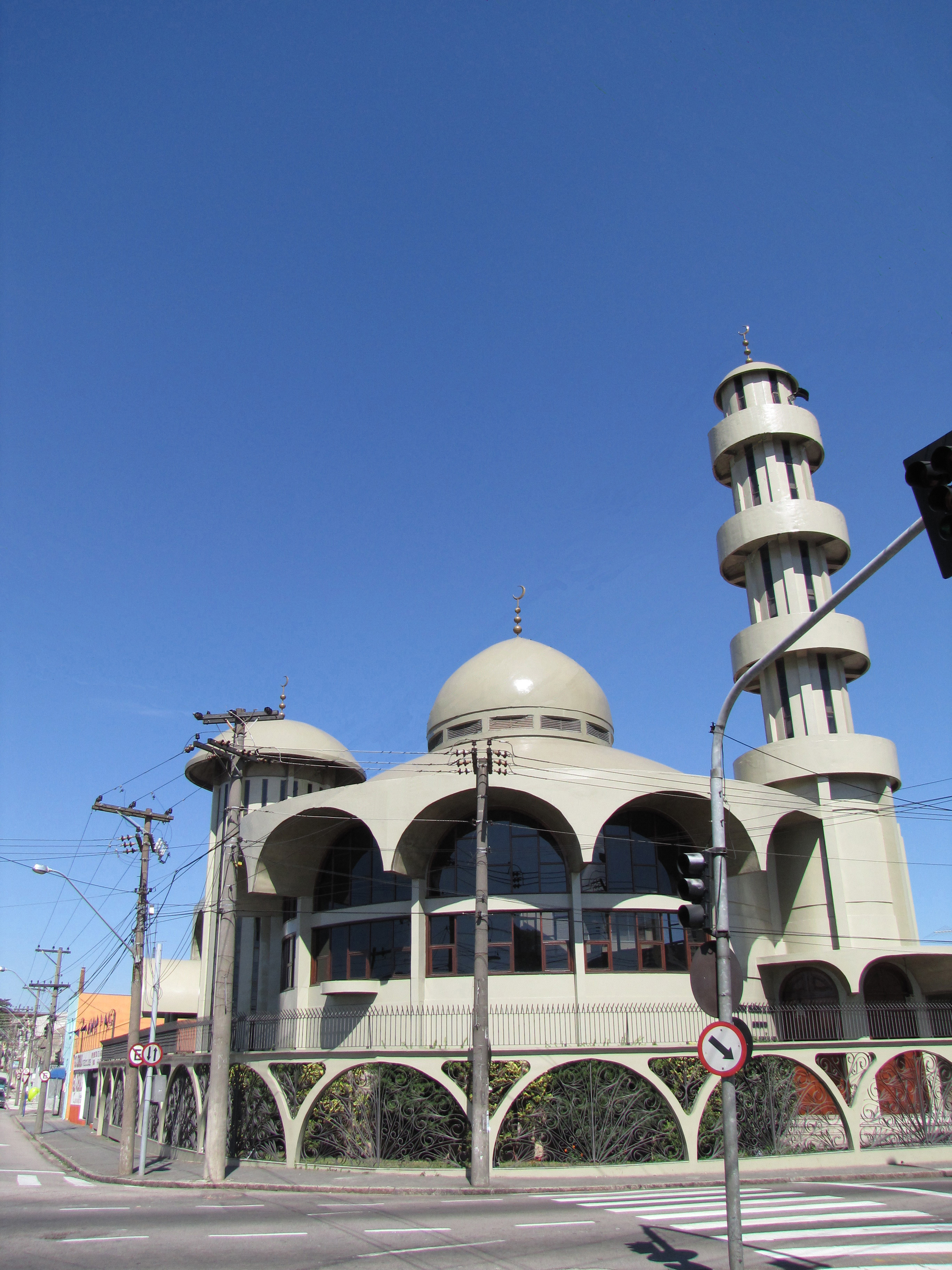 Mesquita de Jundiaí